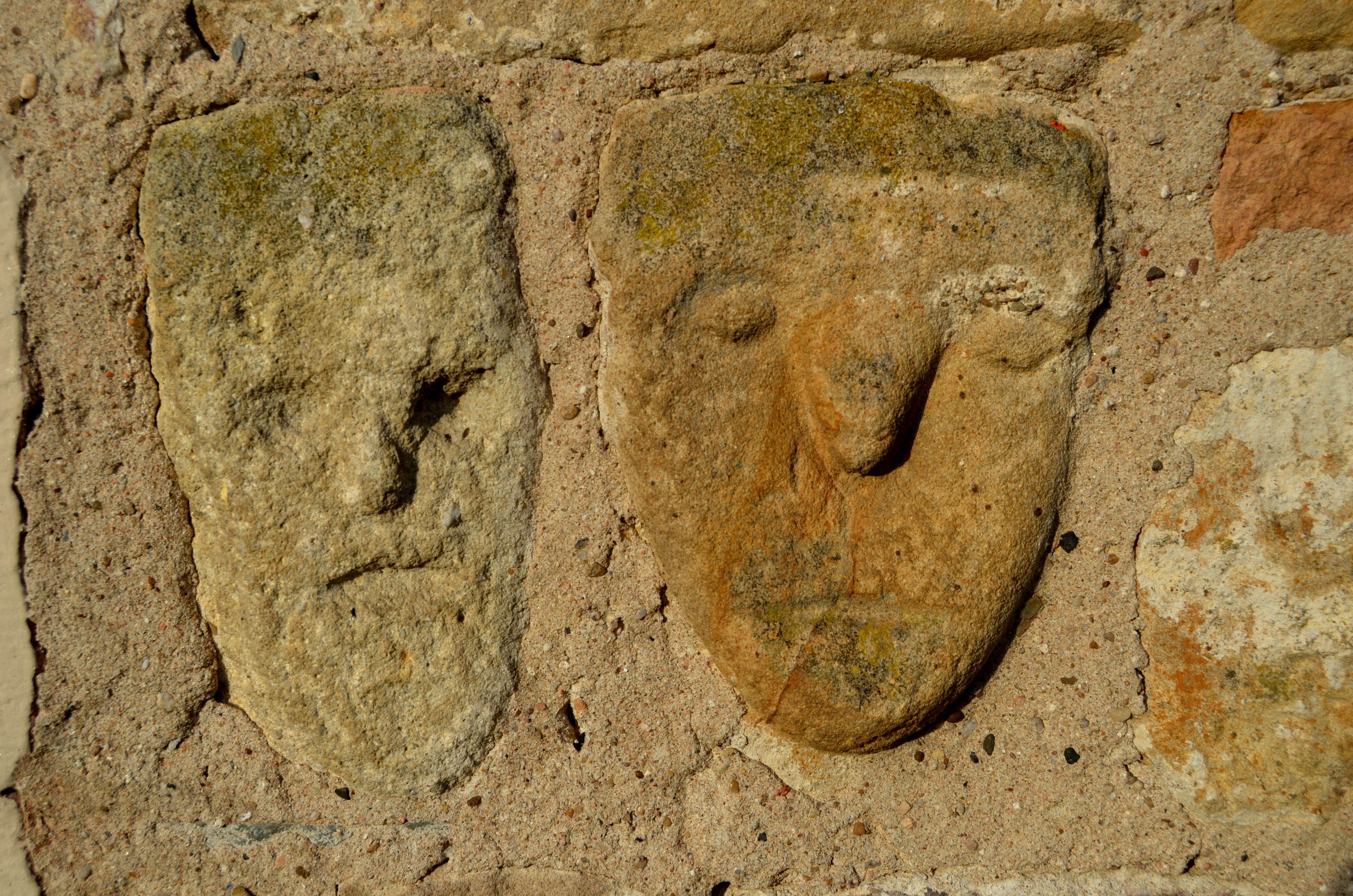 reliëfs van gezichten in de torenmuur